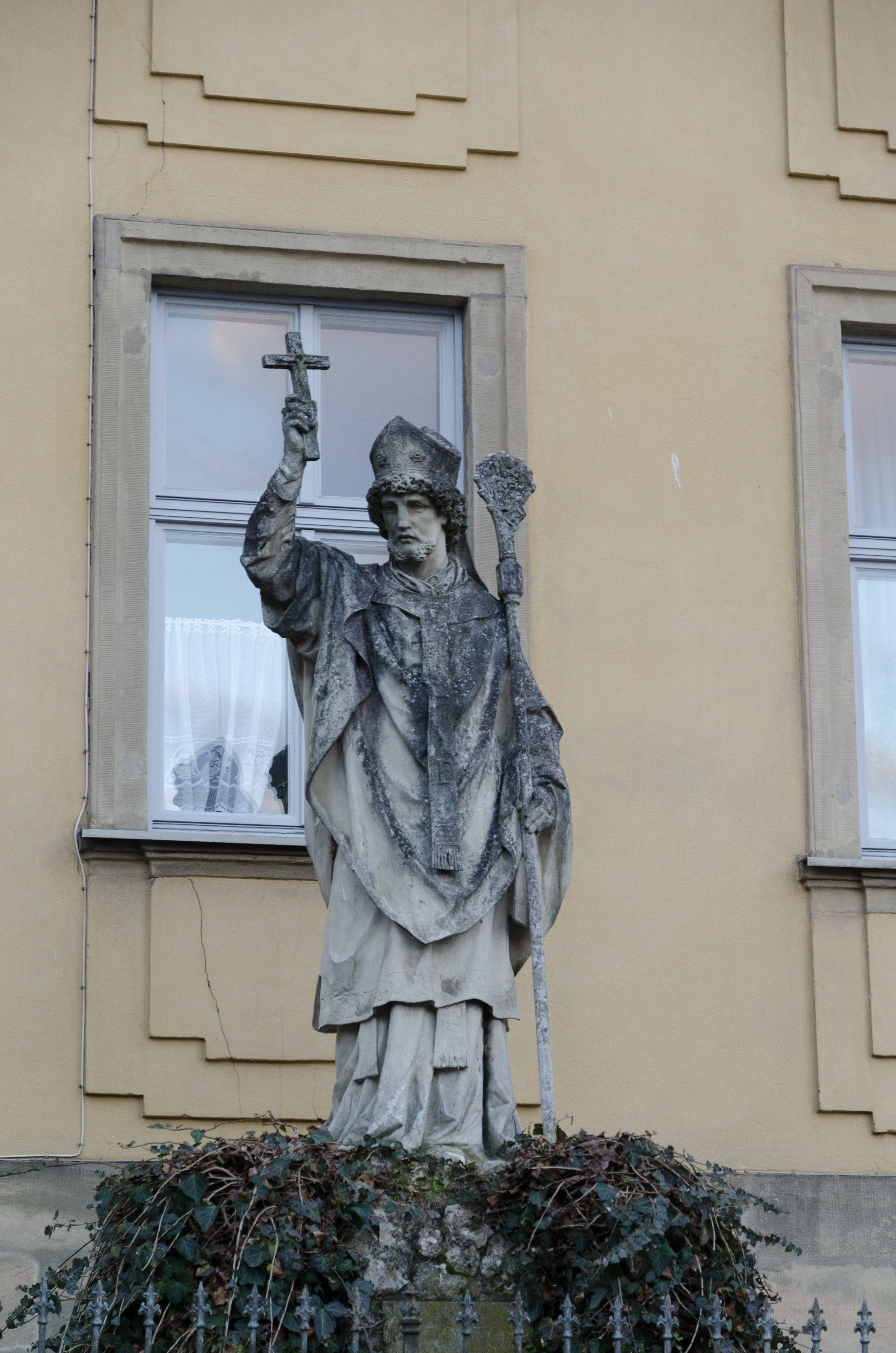 Bamberg, Ottoplatz 1